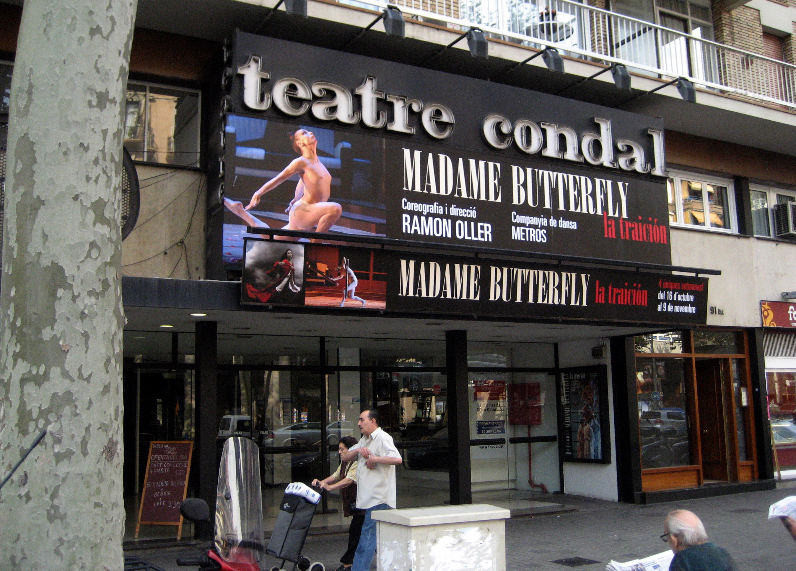 Entrada del Teatre Comtal de Barcelonha (2008)